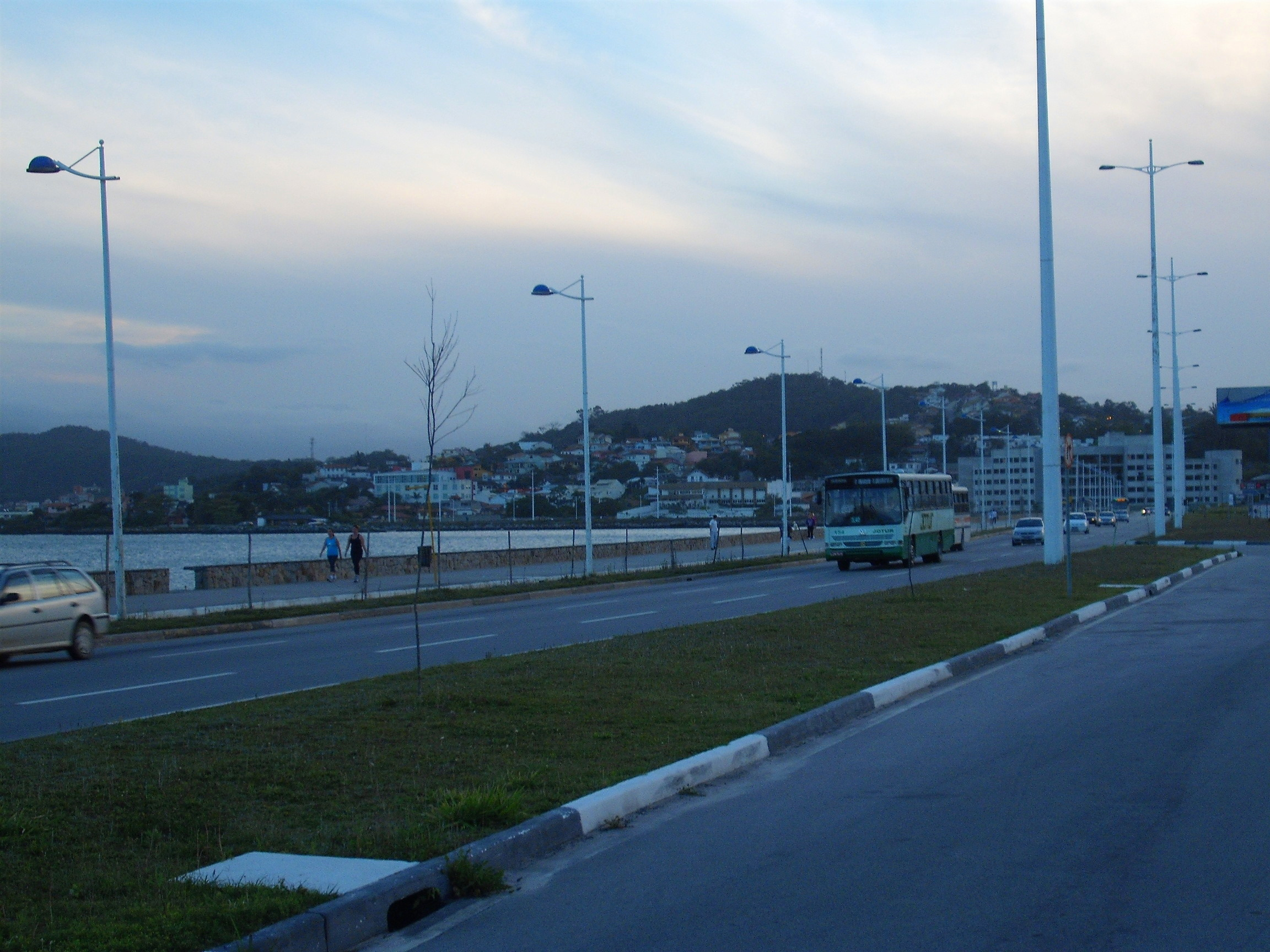 Avenida Beira-Mar de São José, SC - Brasil